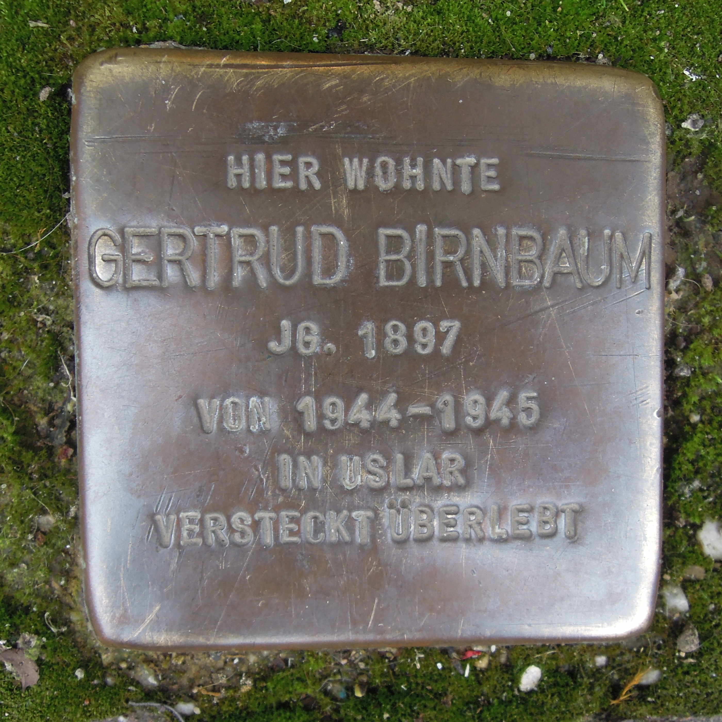 Stolperstein Uslar Lange Straße 24 Gertrud Birnbaum